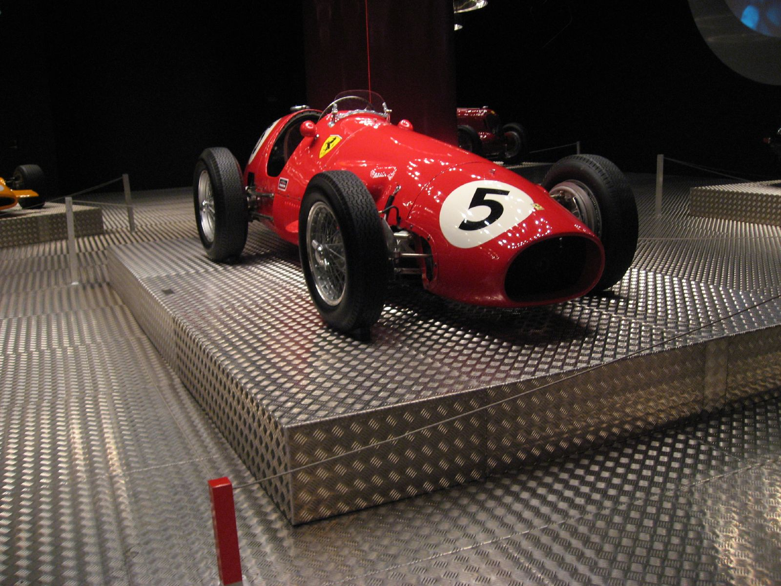 Fra Ingwar Cronhammers racerbilsudstilling på ARoS. Ferrari 500 vandt VM i formel 2 i 1952 og 1953 og var meget overlegen. Bilen har en 2 liters 4 cylindret motor og vandt 14 ud af 15 løb i de to sæsoner. Her fra en anden vinkel.